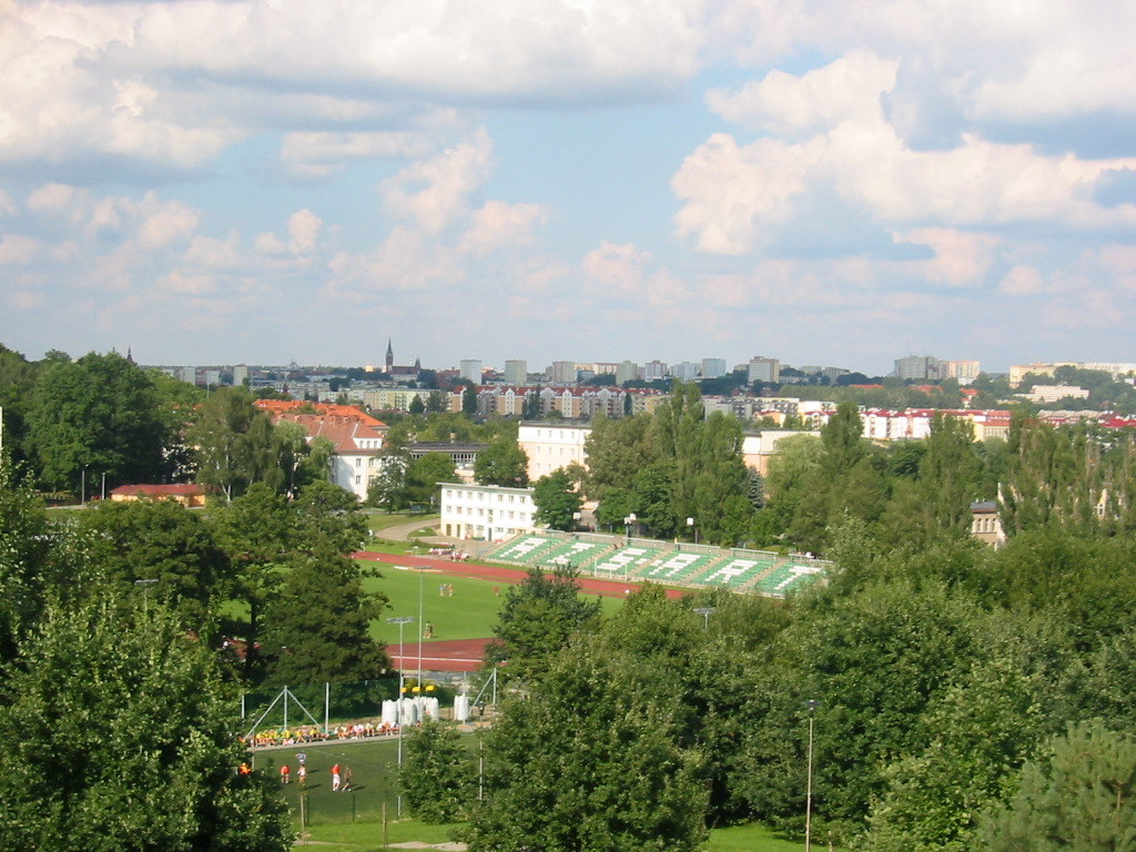 Stadion AZS UWM Olsztyn.